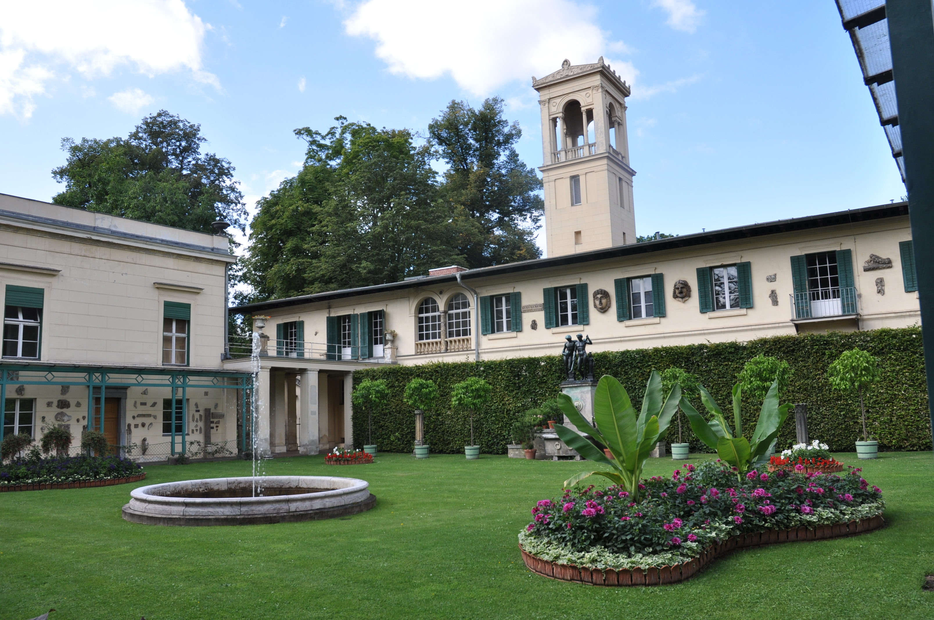 Der Gartenhof des Schlosses Klein-Glienicke, Blick zum Kavalierflügel